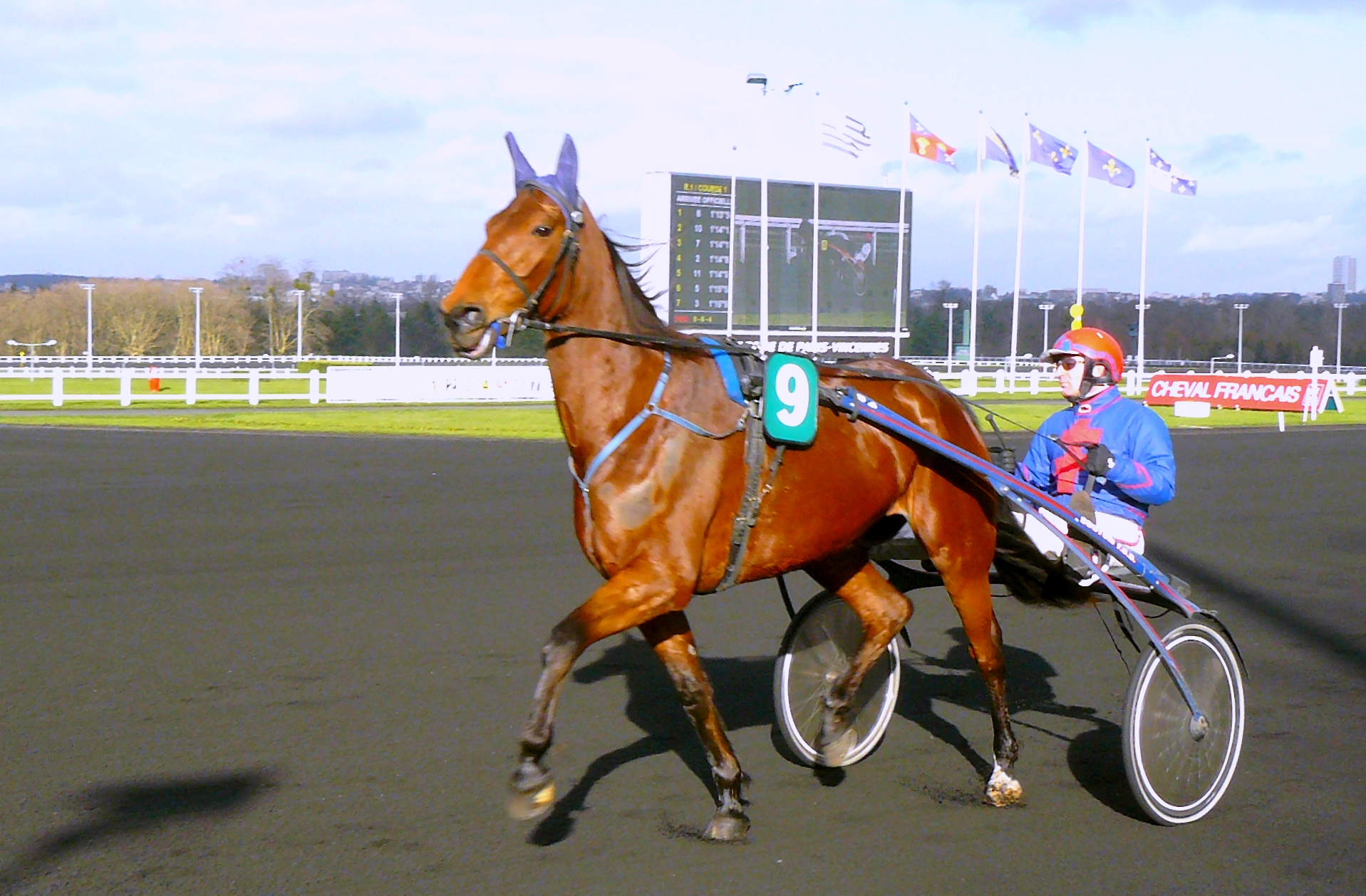 Jean-Philippe Dubois et Queen's Glory à l'échauffement avant le Prix Ténor de Baune à l'hippodrome de Vincennes, le 17 janvier 2010.